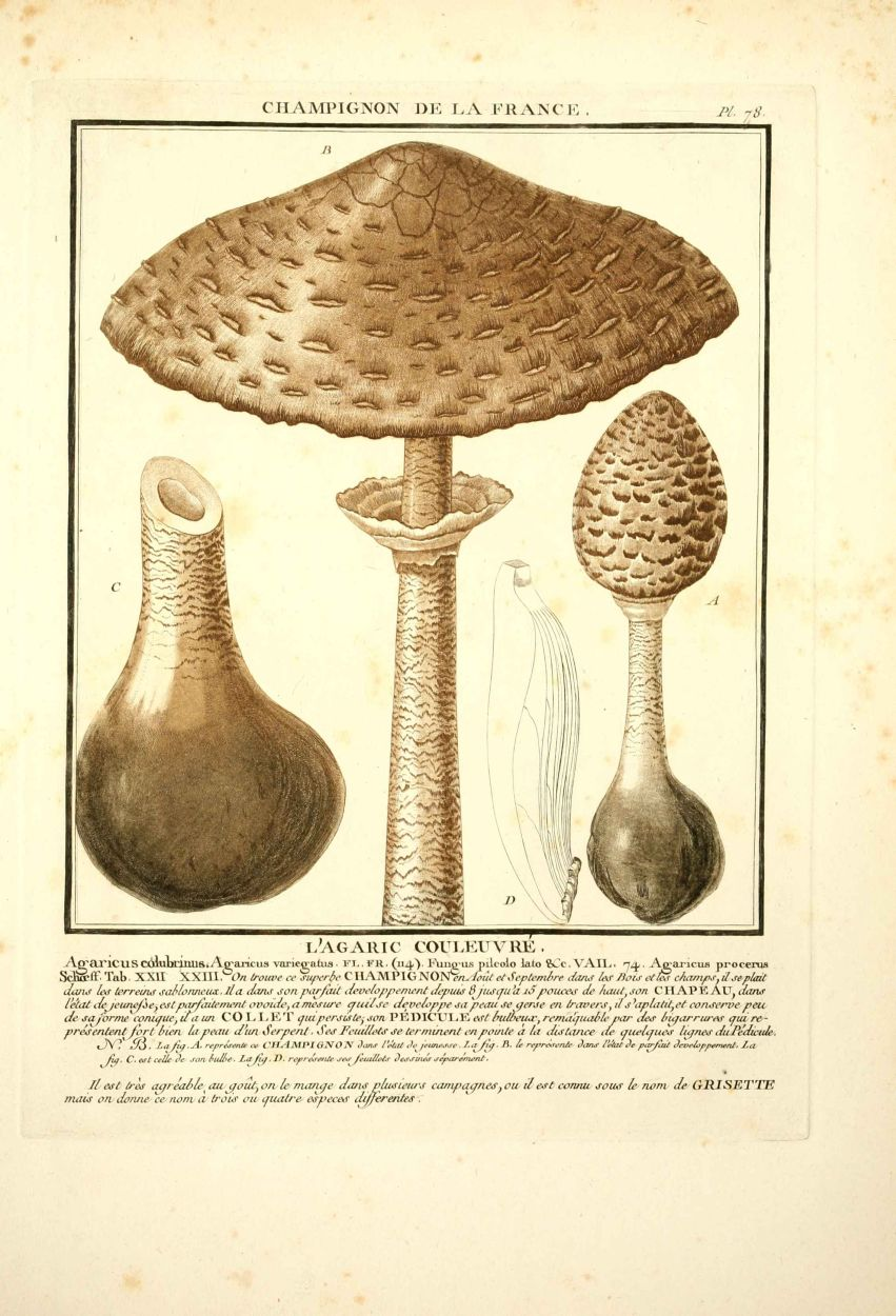 BULLIARD, Pierre, lepiote élevee (coulemelle) ou grisette